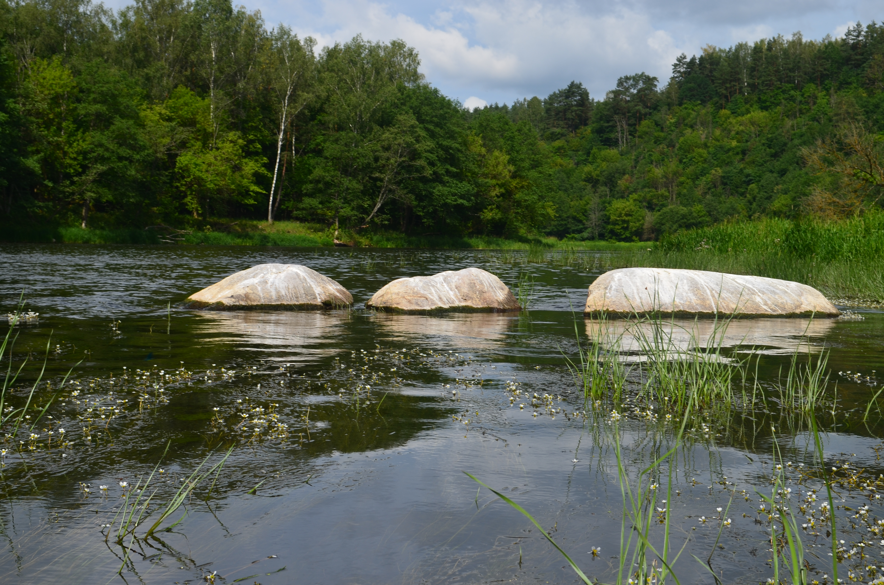 Akmenys "Trys broliai" Neryje prie Naujosios Rėvos, Vilniaus raj.